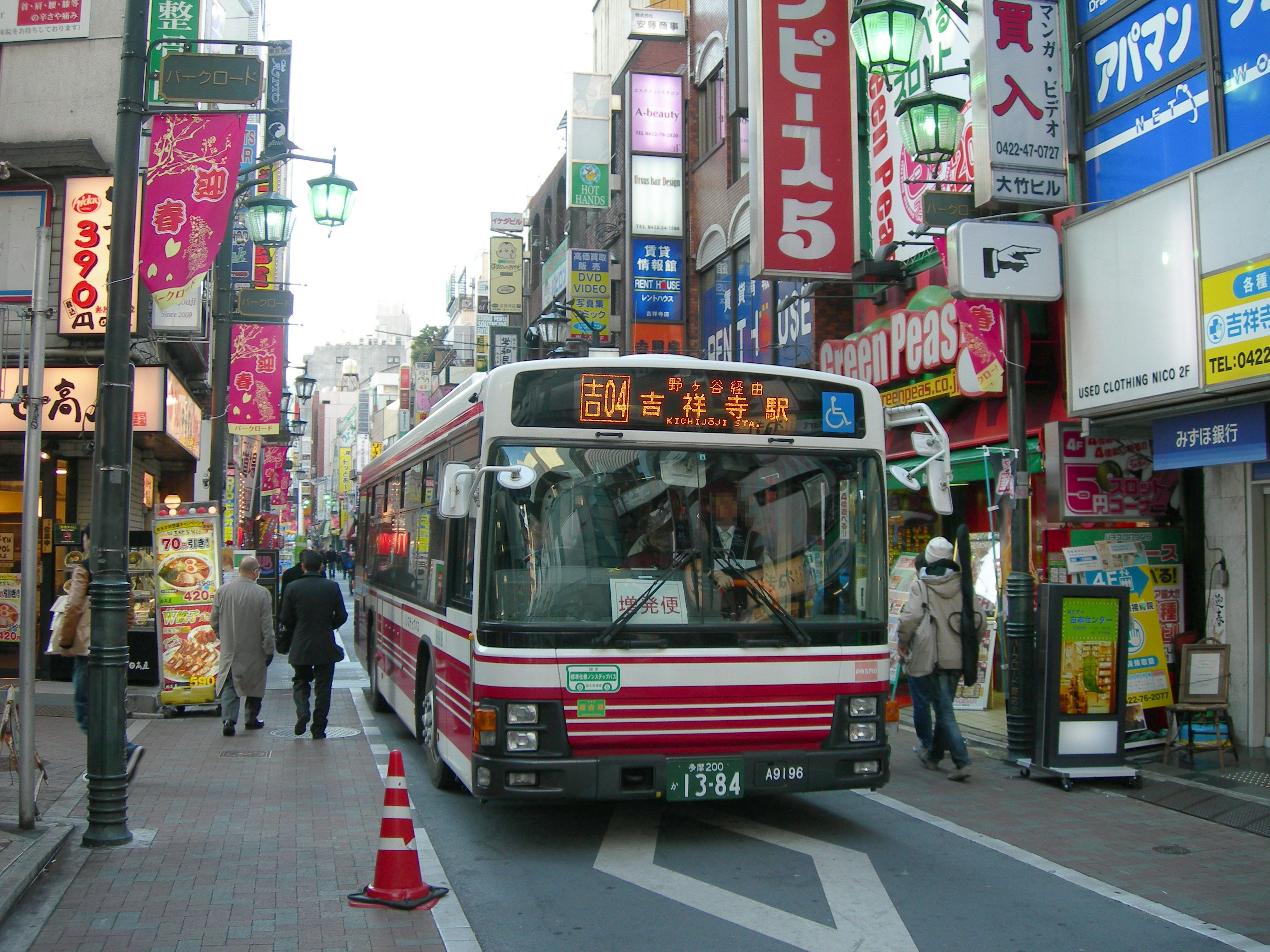 吉祥寺駅公園口（南口）のパークロード商店街を徐行する小田急バス